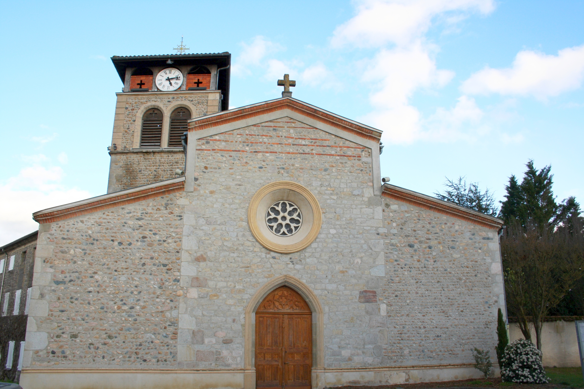 Eglise Saint-Blaise de Boisset-lès-Montrond